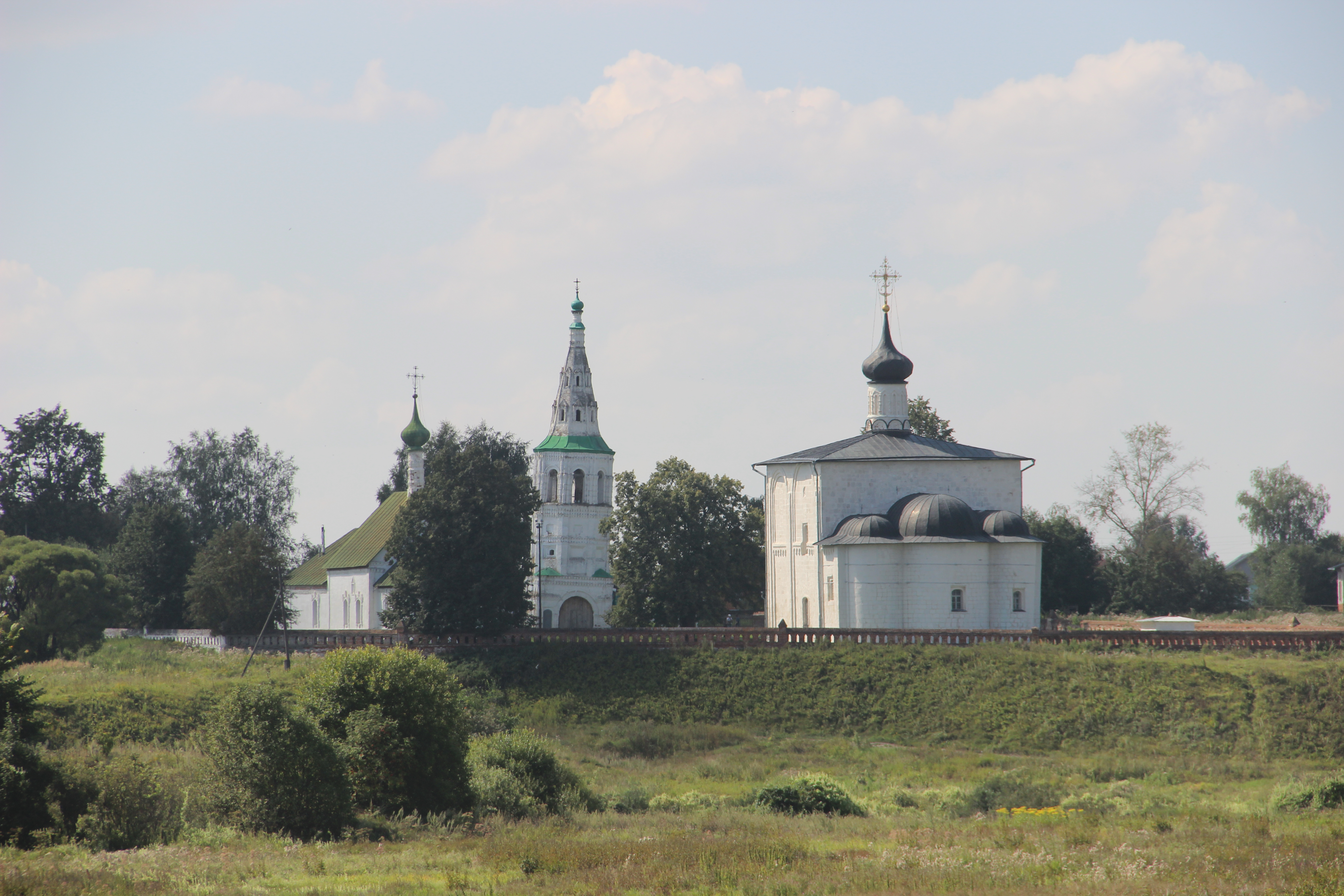 Церковь Бориса и Глеба (Владимирская область, Суздаль, село Кидекша)